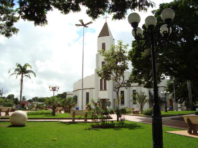 Praça da igreja matriz, em Taciba/SP